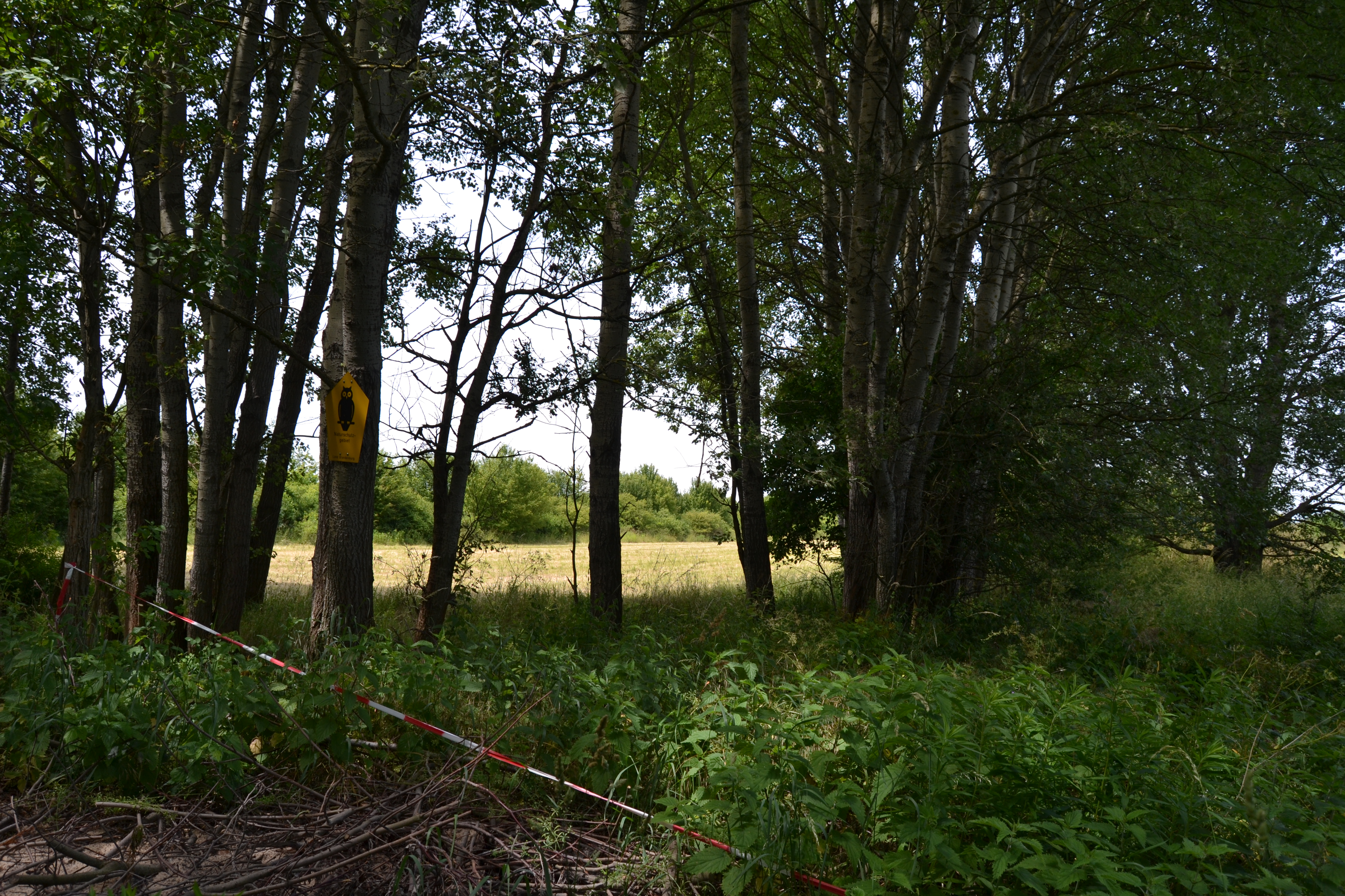 Naturschutzgebiet Fredersdorfer Mühlenfließ. Langes Luch und Breites Luch bei Schöneiche im Juni 2014 in Fredersdorf-Vogelsdorf, zwischen Bundesstraße 1 und Schöneiche.